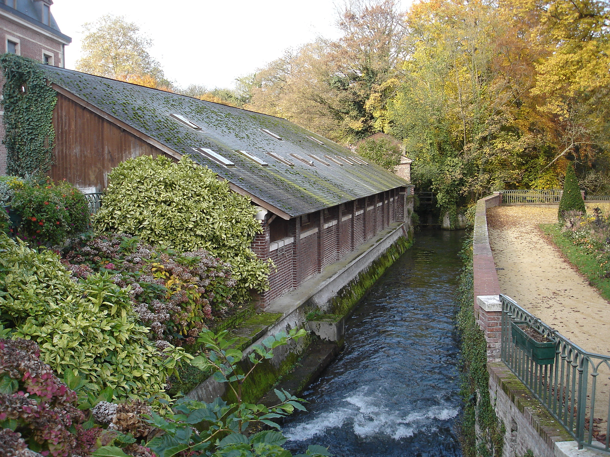 La Teinturerie au pied du château d'Eu longeant le jardin des Fontaines